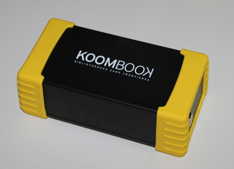 Le KoomBook, une bibliothèque numérique portative par Bibliothèques sans frontières